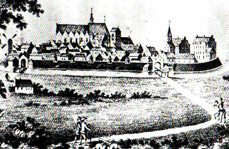 Esens im Jahre 1714. Zeitgenössische Zeichnung